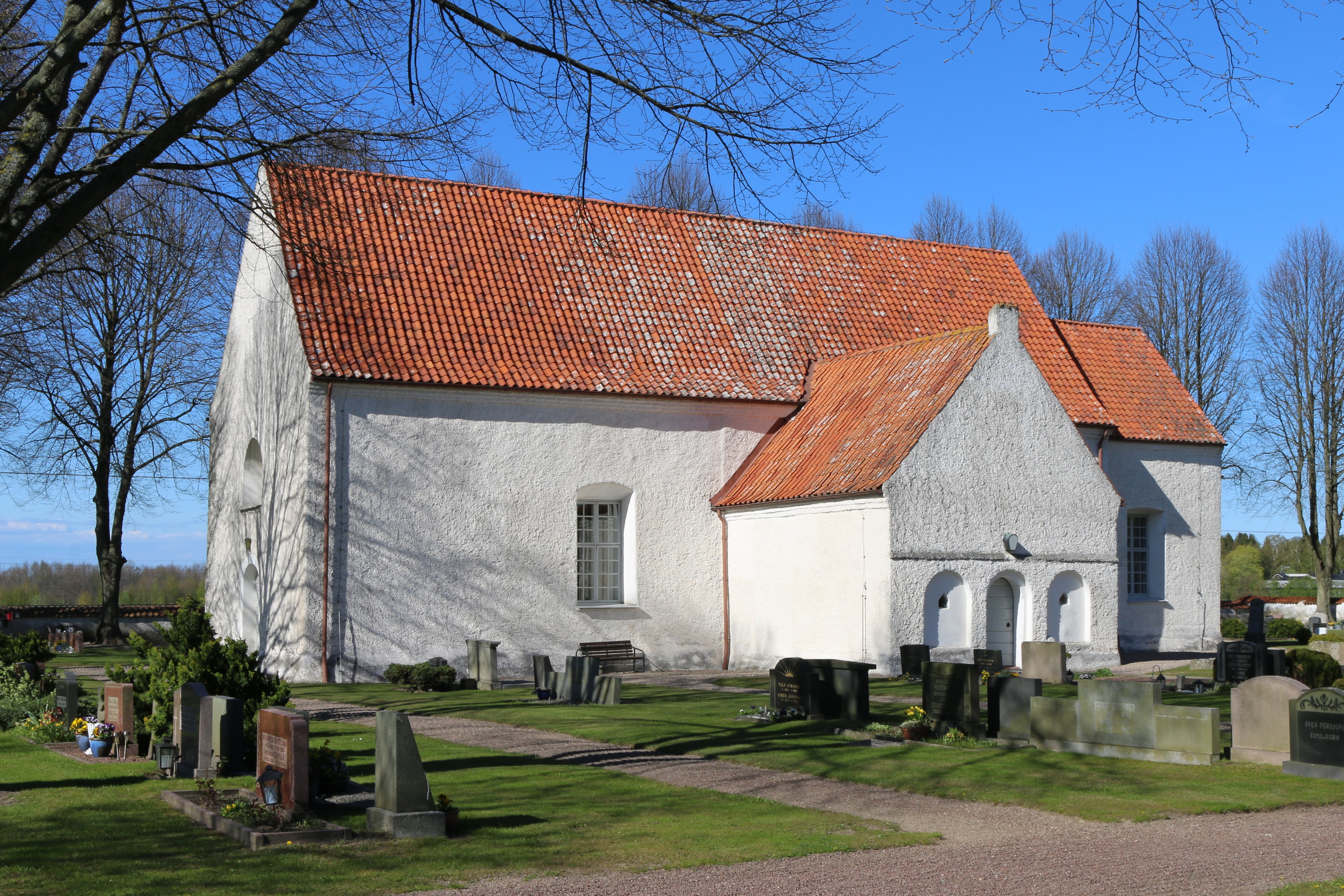 Gualövs kyrka, maj 2017